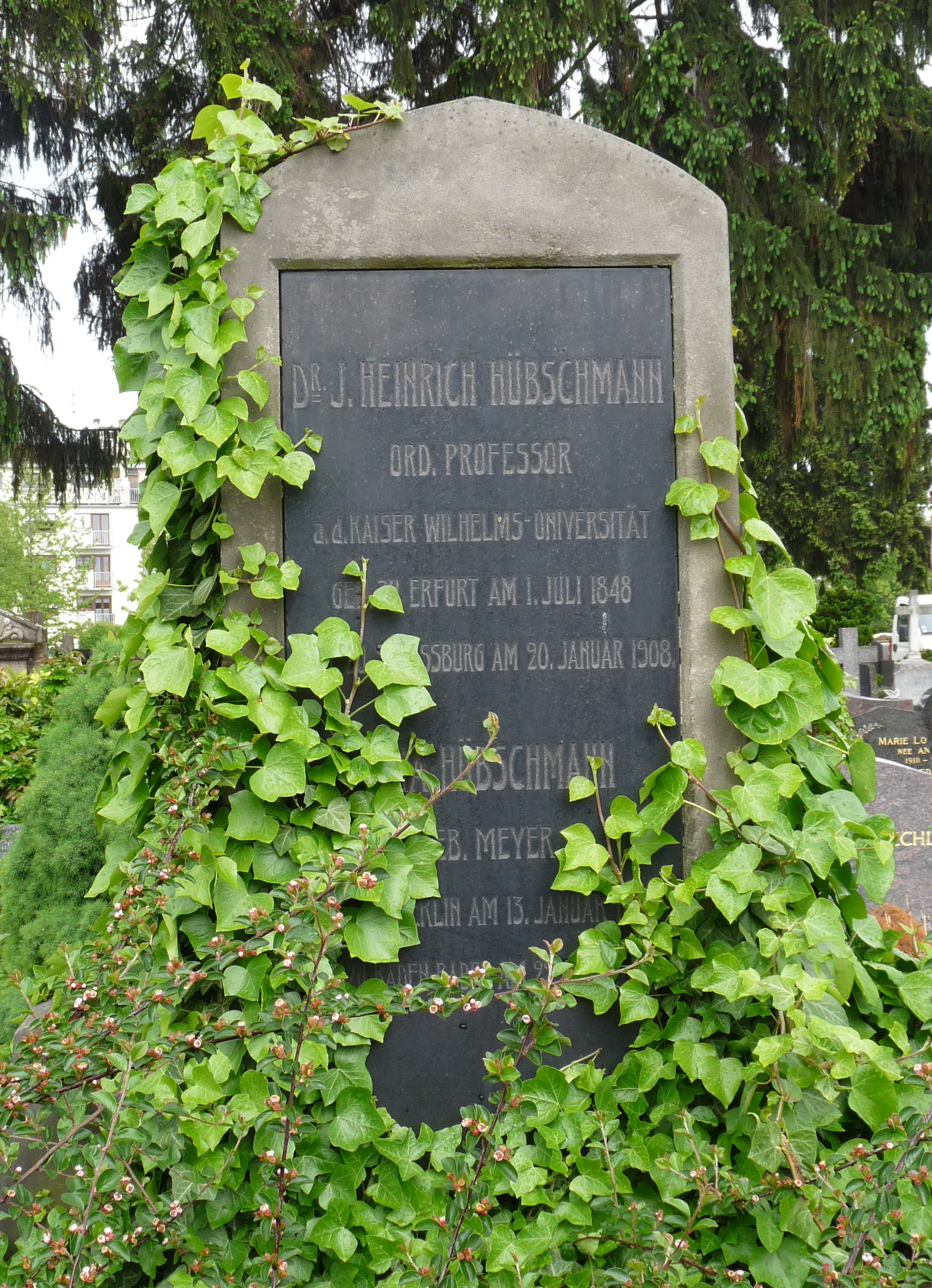 Grab von Professor Heinrich Hübschmann auf dem Friedhof Saint-Louis de la Robertsau in Strasbourg.